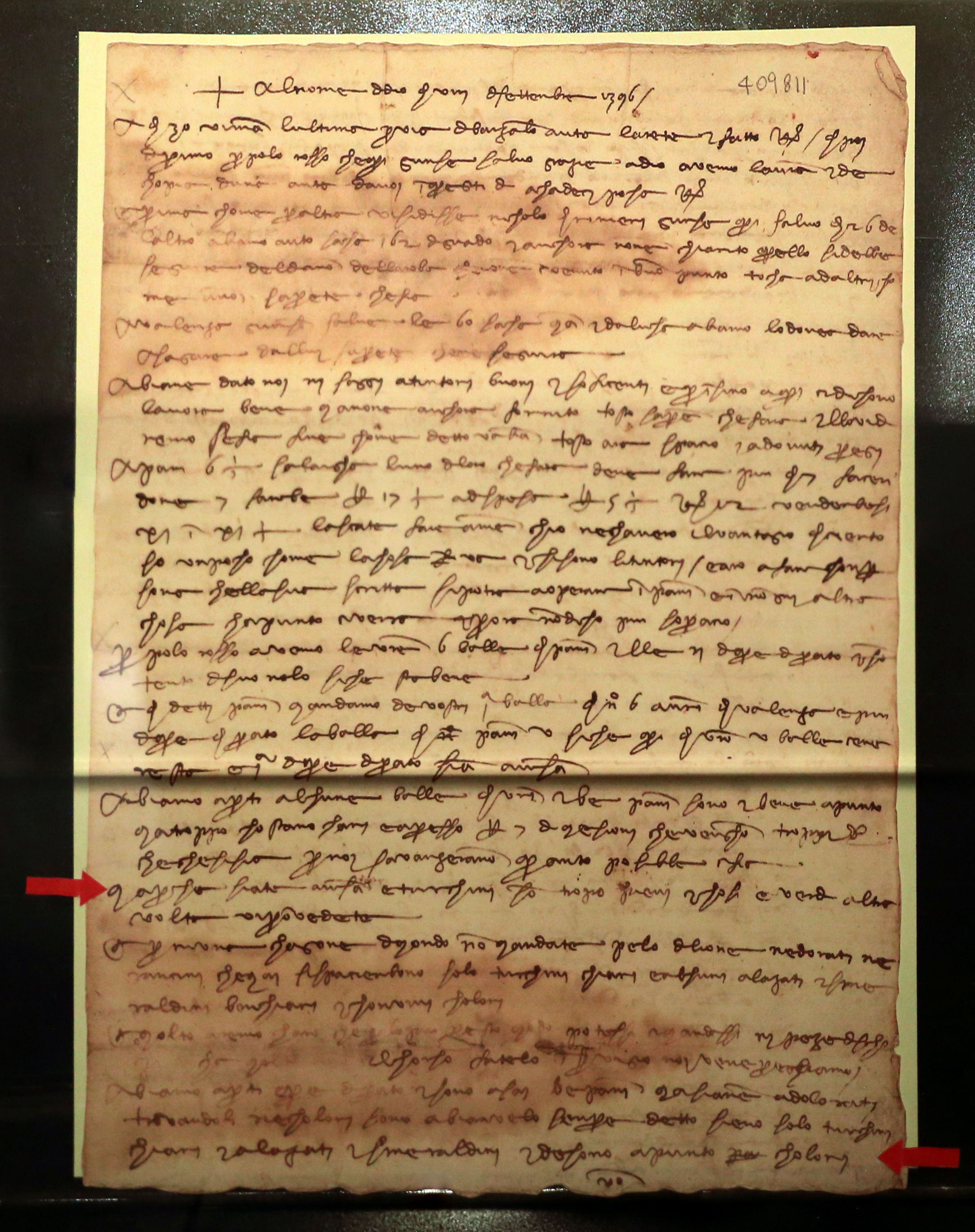 Museo del tessuto This is a photo of a monument which is part of cultural heritage of Italy.